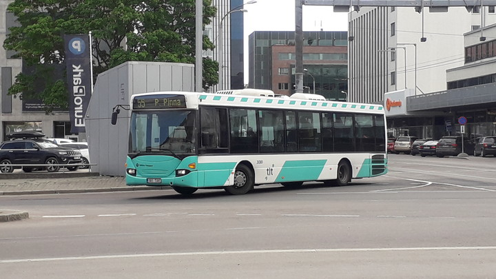 Bussiliin. 55 keeramas A.Laikmaa tänavalt Gonsiori tänavale